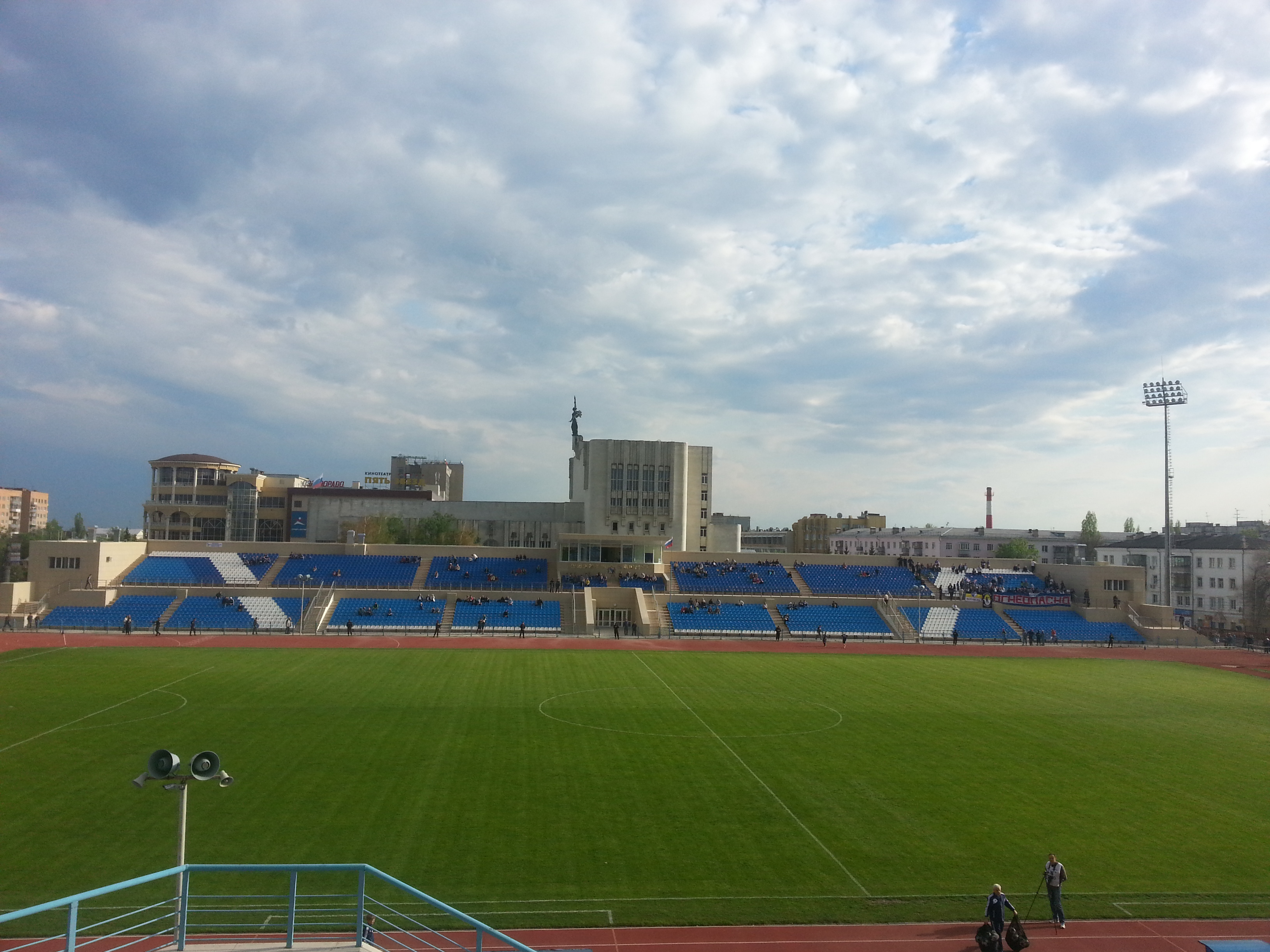 Курск. Южная трибуна стадиона "Трудовые резервы"